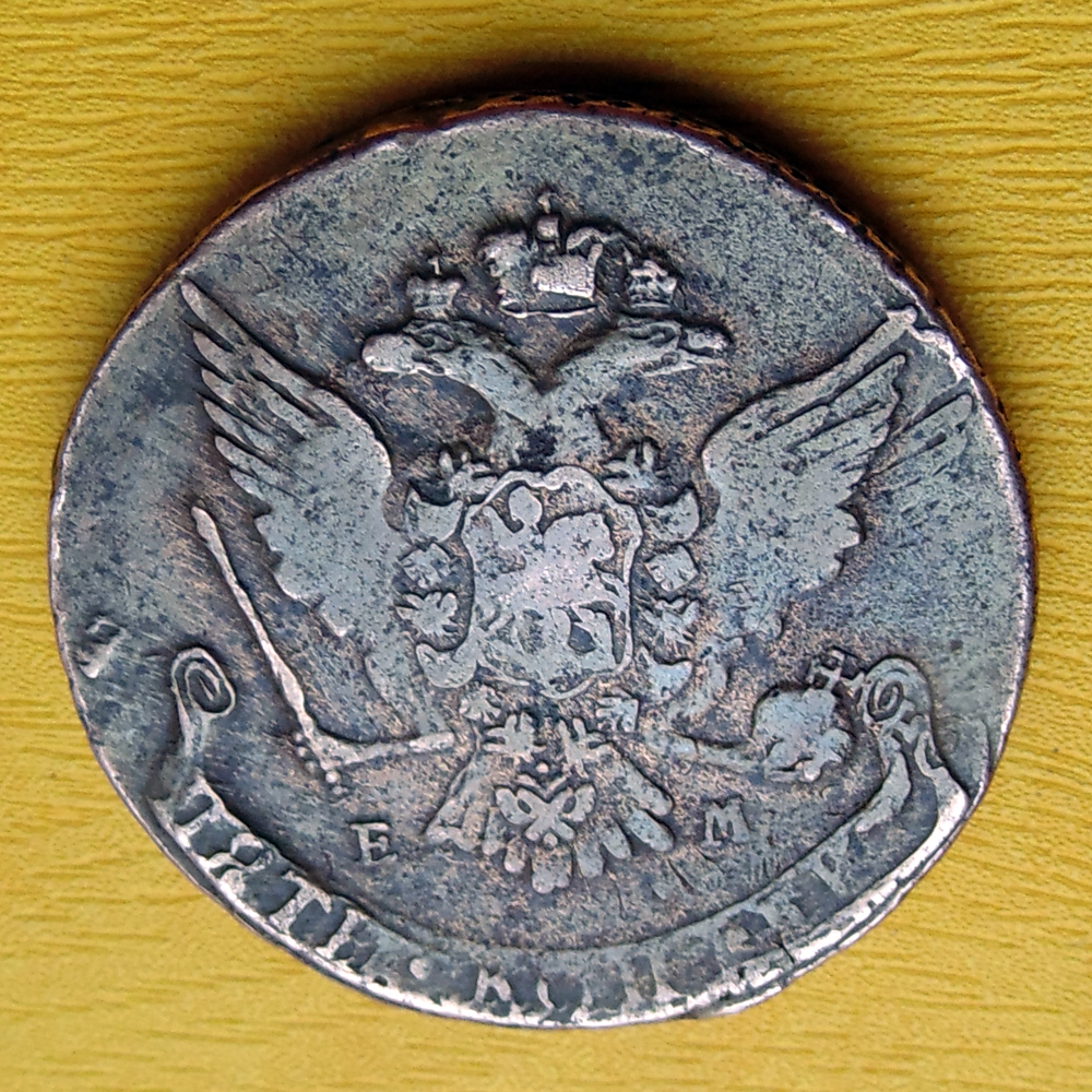 Медный пятак 1765 года, Екатеринбургский монетный двор (ЕМ). Герб Российской Империи.